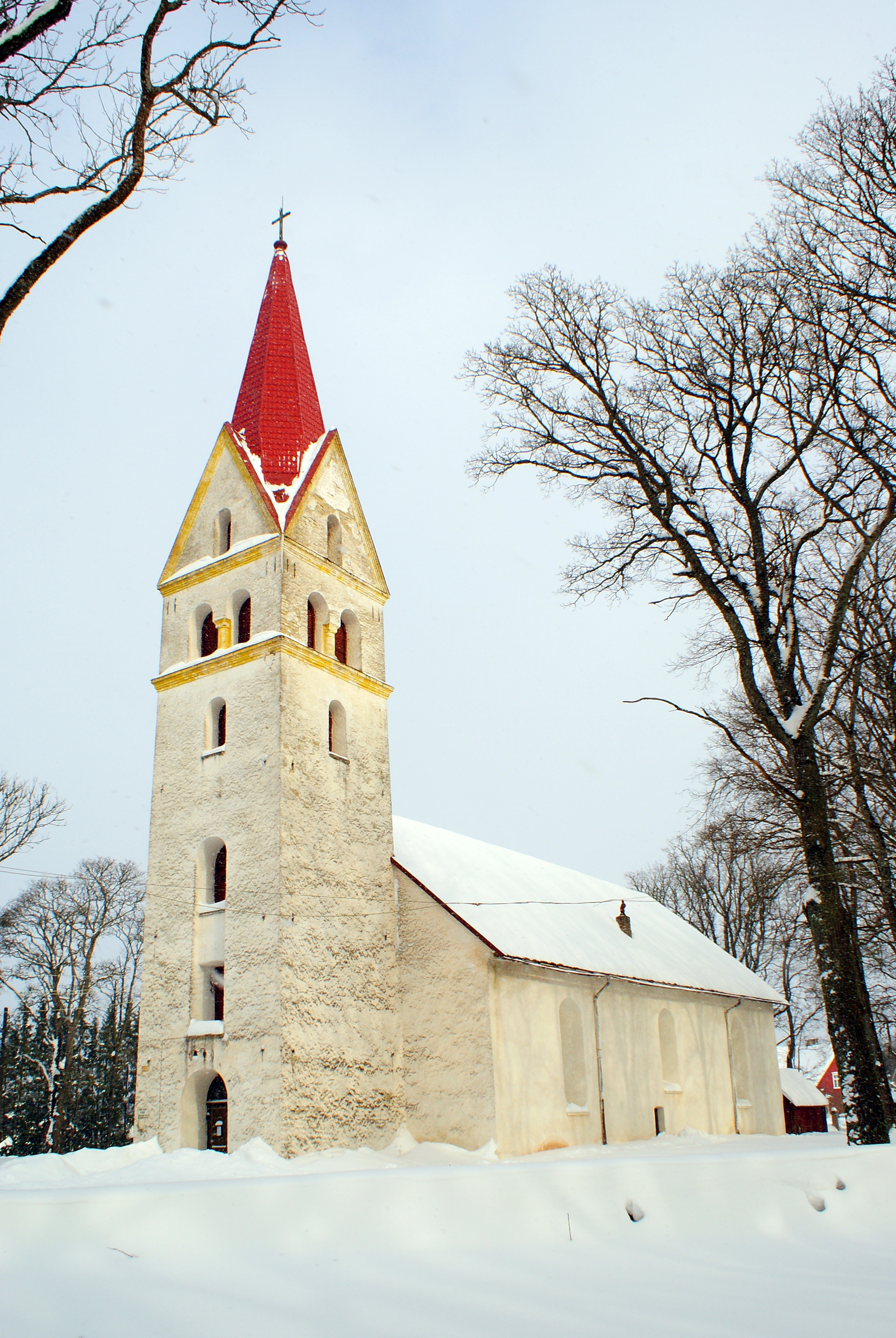 Pärnu-Jaagupi kirik